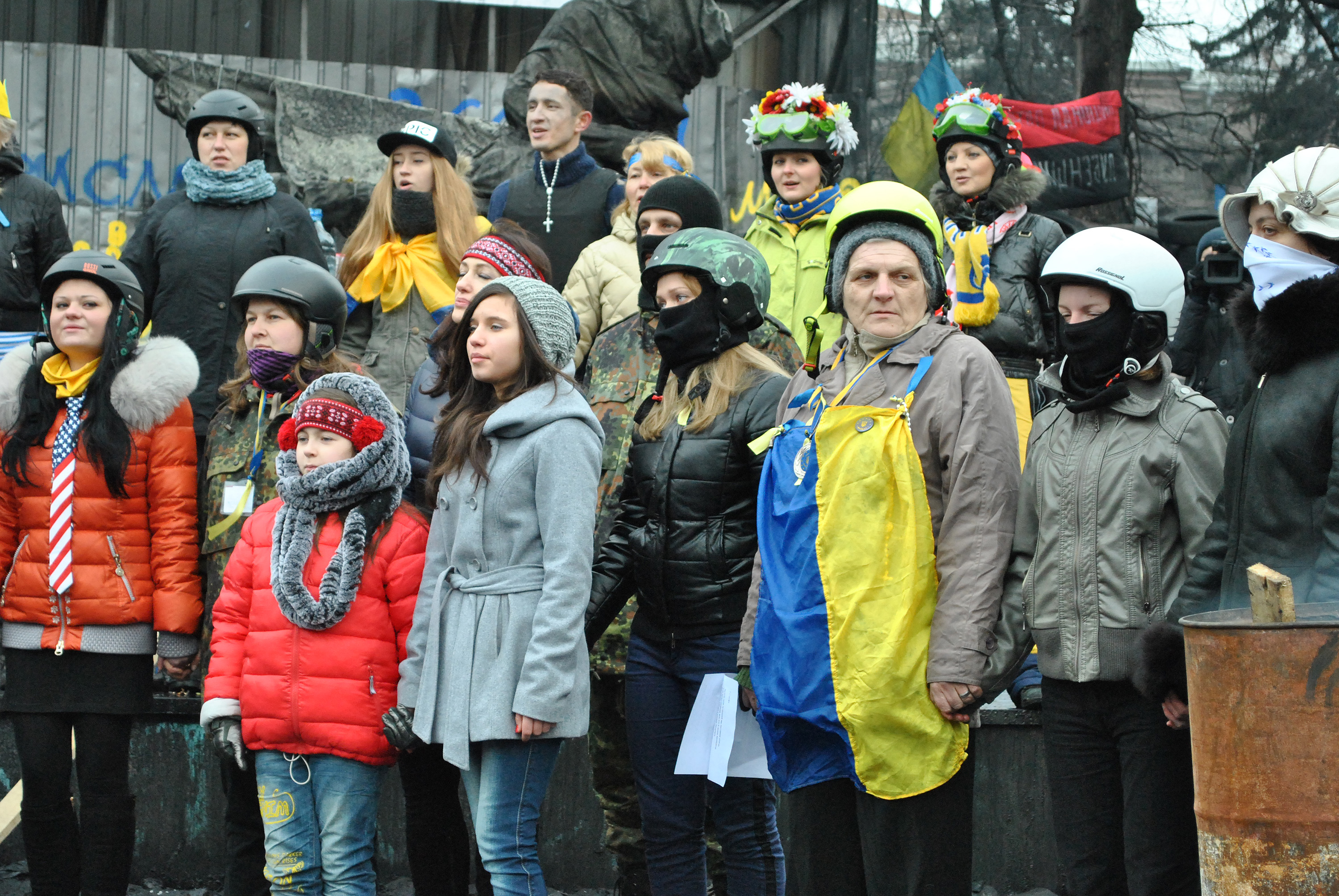 Український співак-репер, волонтер, автор пісні «Revolution Ukraine» Artisto (Ростислав Хитряк) під час запису відеокліпу на вулиці Михайла Грушевського в Києві 16 лютого 2014 року.